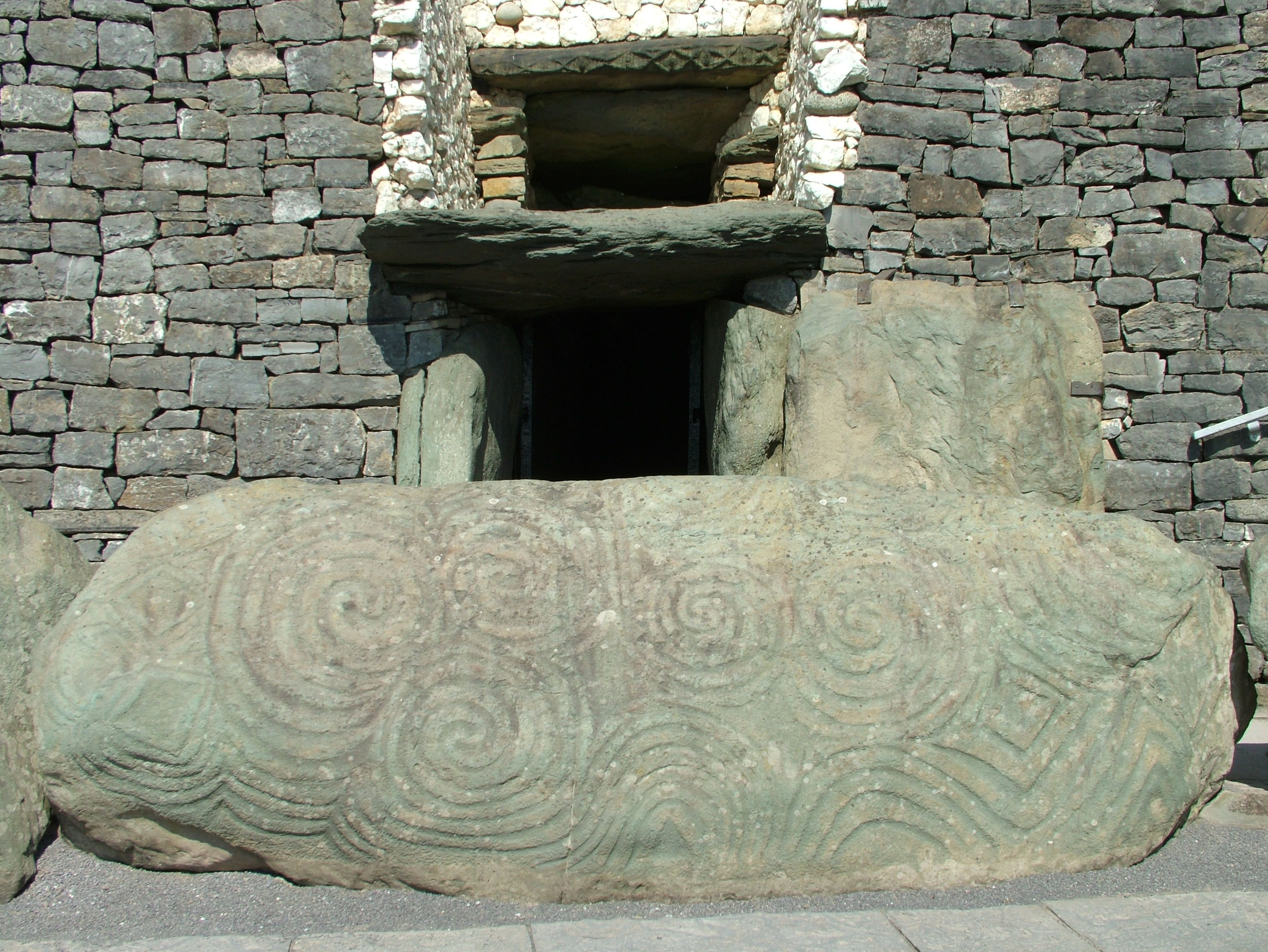 Newgrange, Stein am Eingang